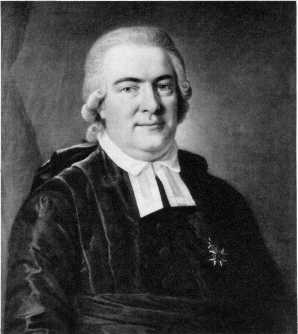 Olof Wallqvist (1755-1800), biskop i Växjö.